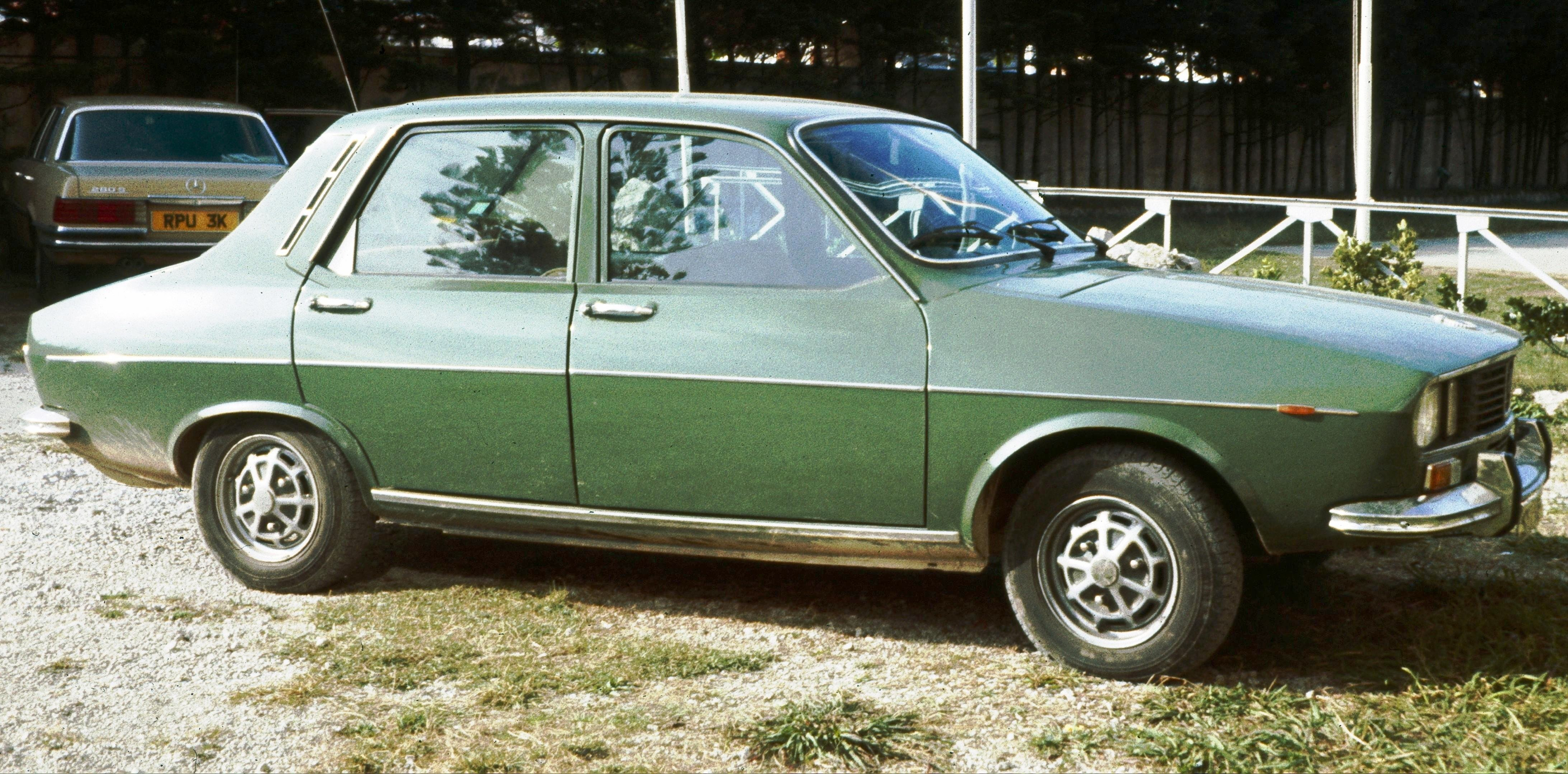 Fasa-Renault 12 S (Spain)